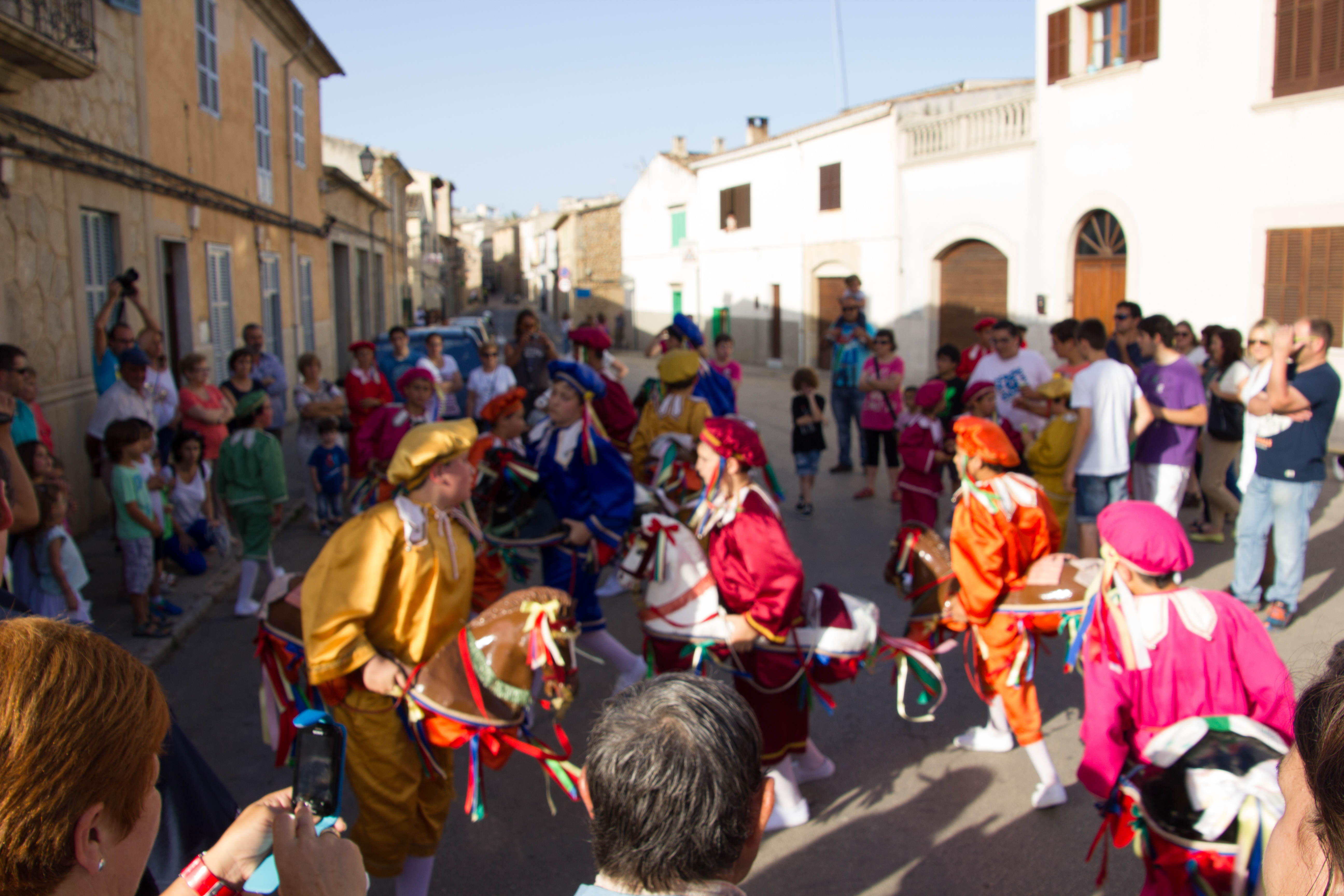 Cavallets d'Artà